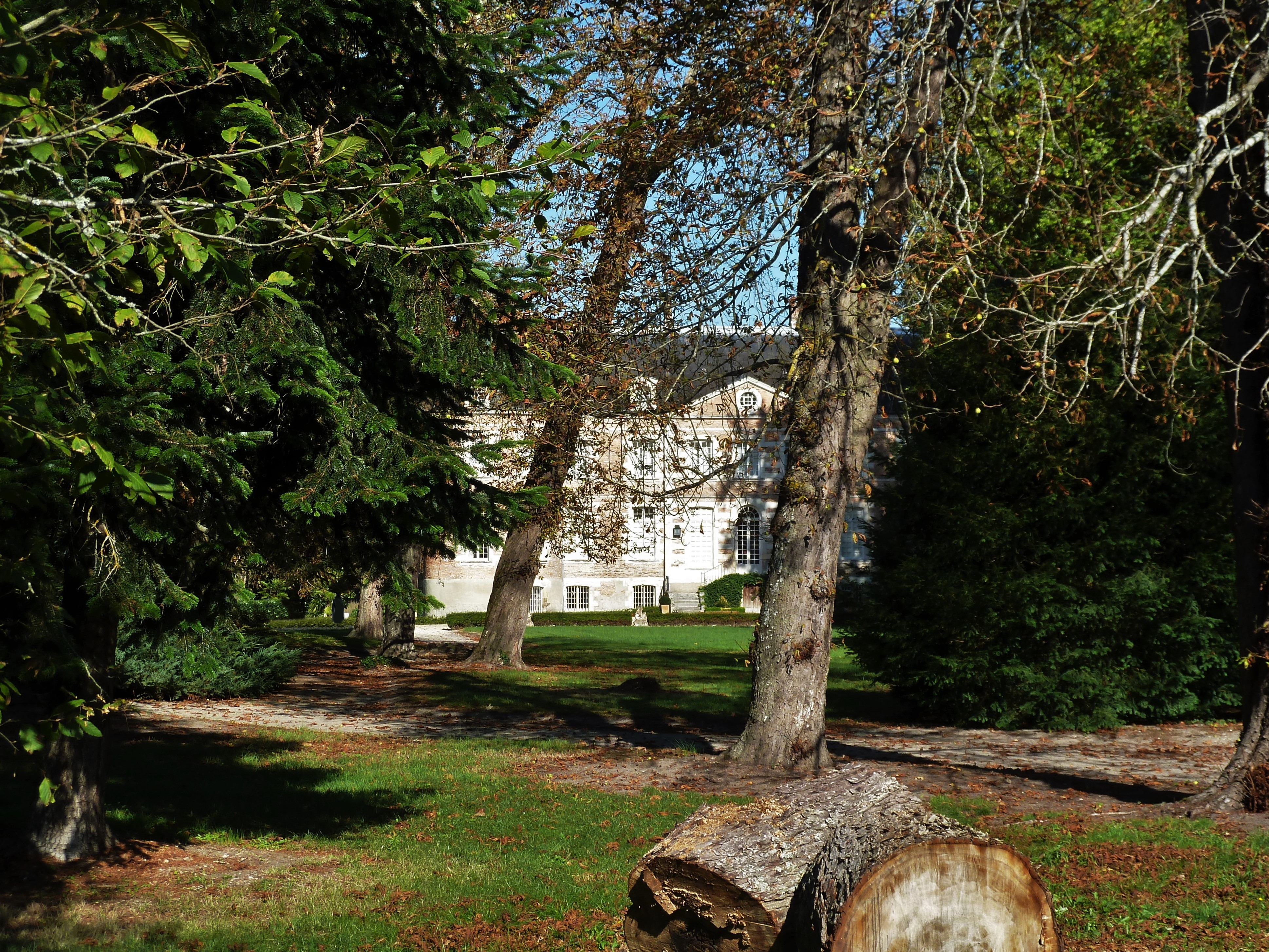 Le Château de La Ferté-Beauharnais.- Loir-et-Cher .